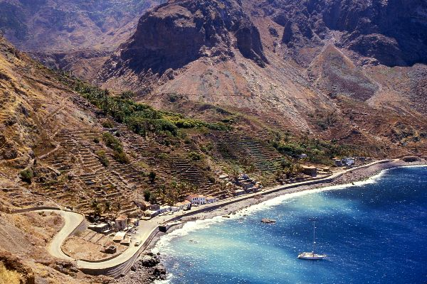 Bucht und Fischerdorf Fajã de Agua im Westen der Insel Brava